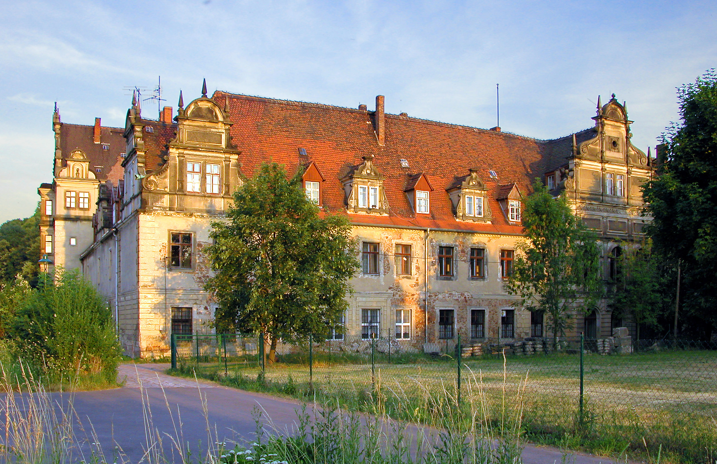 Schloss Gauernitz von Westen (GMP: 51.115549,13.557013)